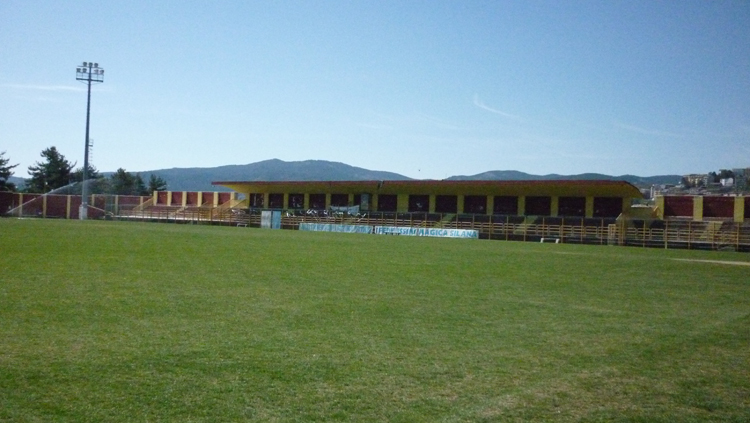 Stadio Comunale "Valentino Mazzola" - San Giovanni in Fiore - le tribune2Categoria:San Giovanni in FioreCategoria:Impianti sportivi della Calabria